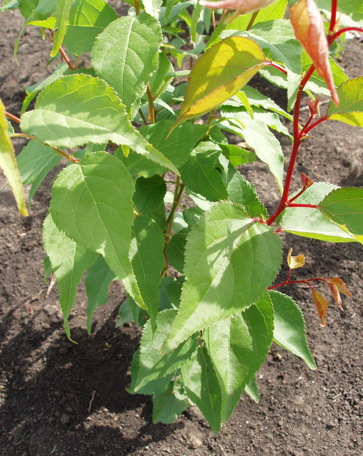 Листва Абрикоса маньчжурского